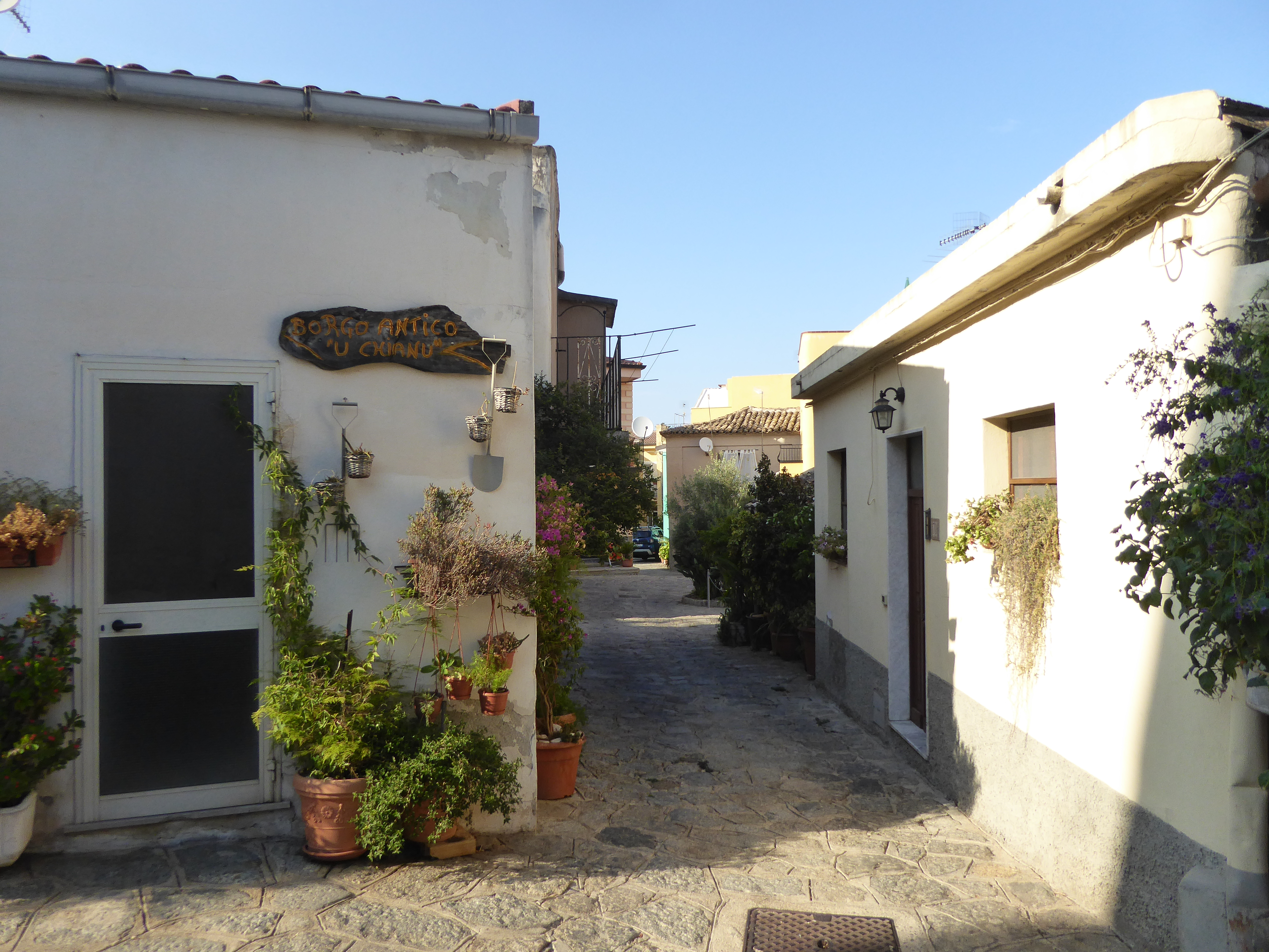 Borgo antico di Soverato Superiore - U chjanu (agosto 2019)